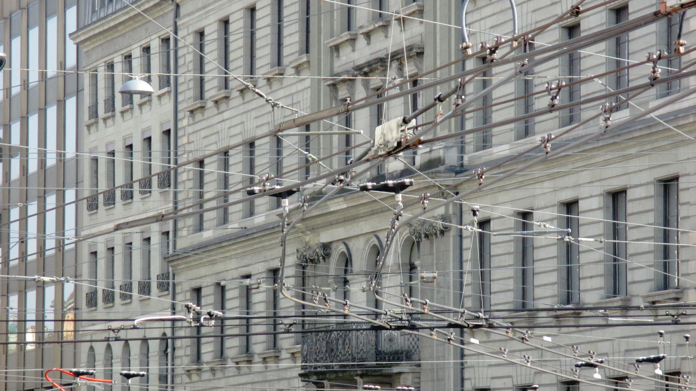 Ligne aérienne TPG